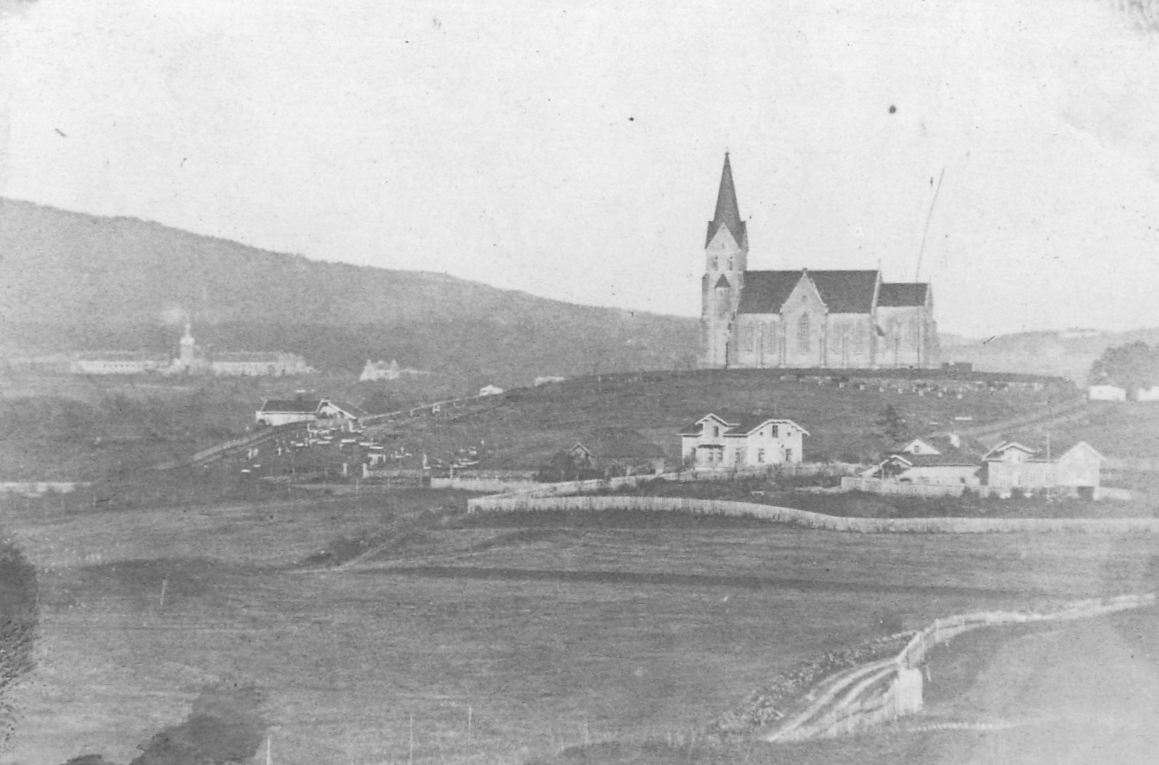 Vestre Aker kirke 1865. Gaustad sykehus i bakgrunnen.